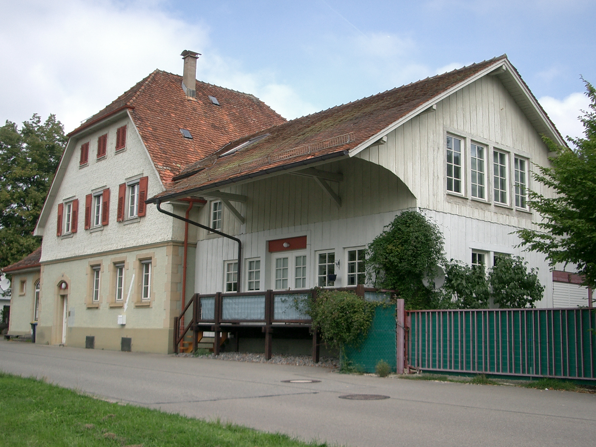 Bahnhof Wehingen der ehemaligen Heubergbahn, Strassenseite